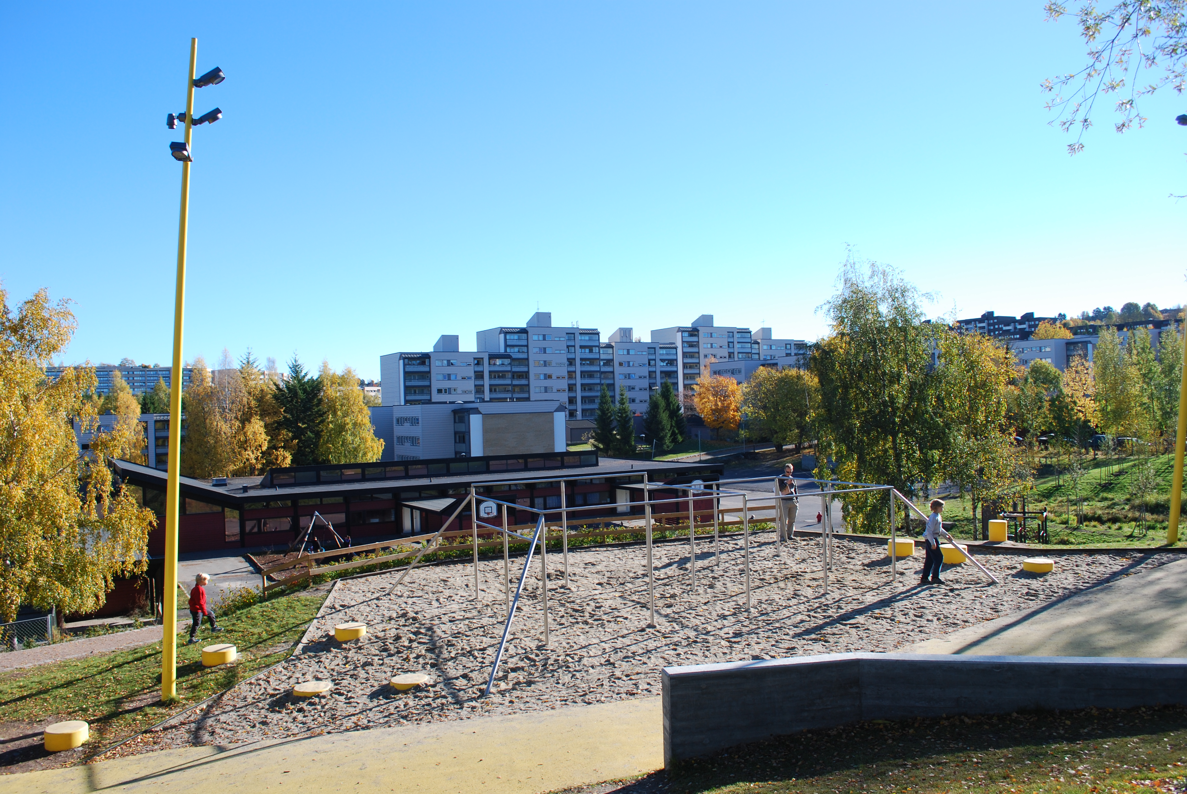 Verdensparken, Furuset, Oslo. Lekeområde midt i parken